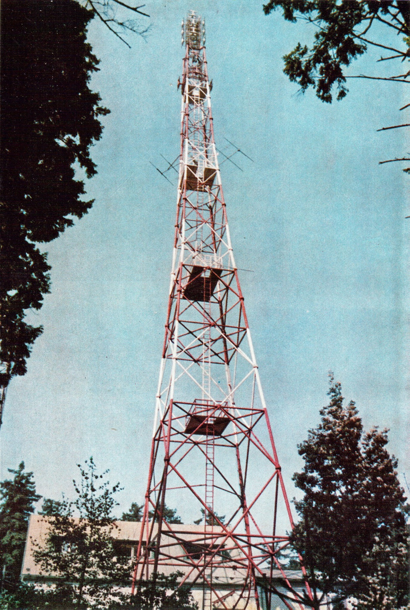 Javořice – starý vysílač (1960–1990). Fotografie z počátku 80. let. Obvykle sloužil i jako rozhledna, o čemž svědčí četné vzpomínky místních občanů, ale i kolemjdoucích turistů z daleka. I pracovníci obsluhy – pokud zde byli zrovna přítomni – byli v tomto ohledu vstřícní. V současnosti je vysílač před nezvanou návštěvou elektronicky střežen.